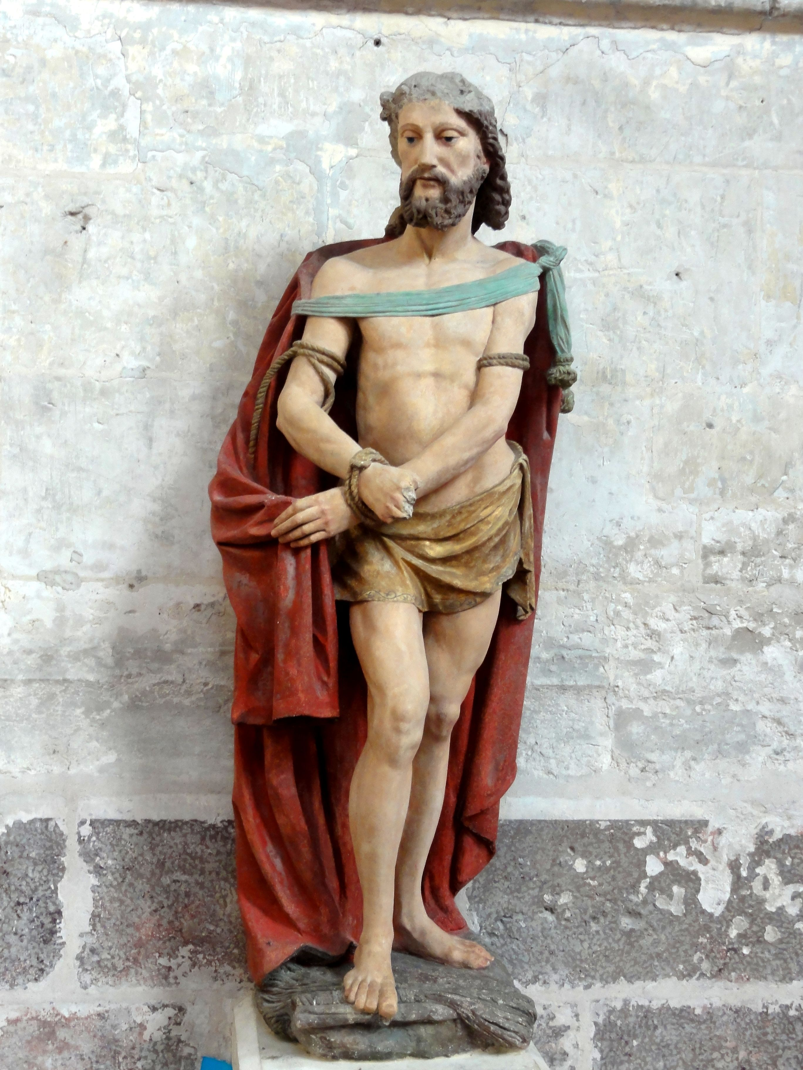 Christ aux liens.